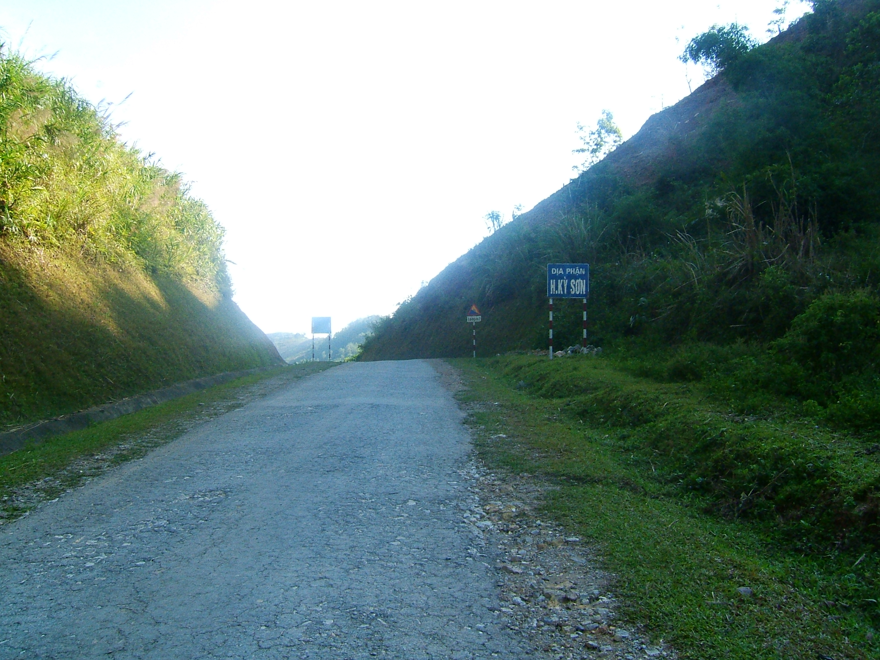 Border Sign to Kỳ Sơn